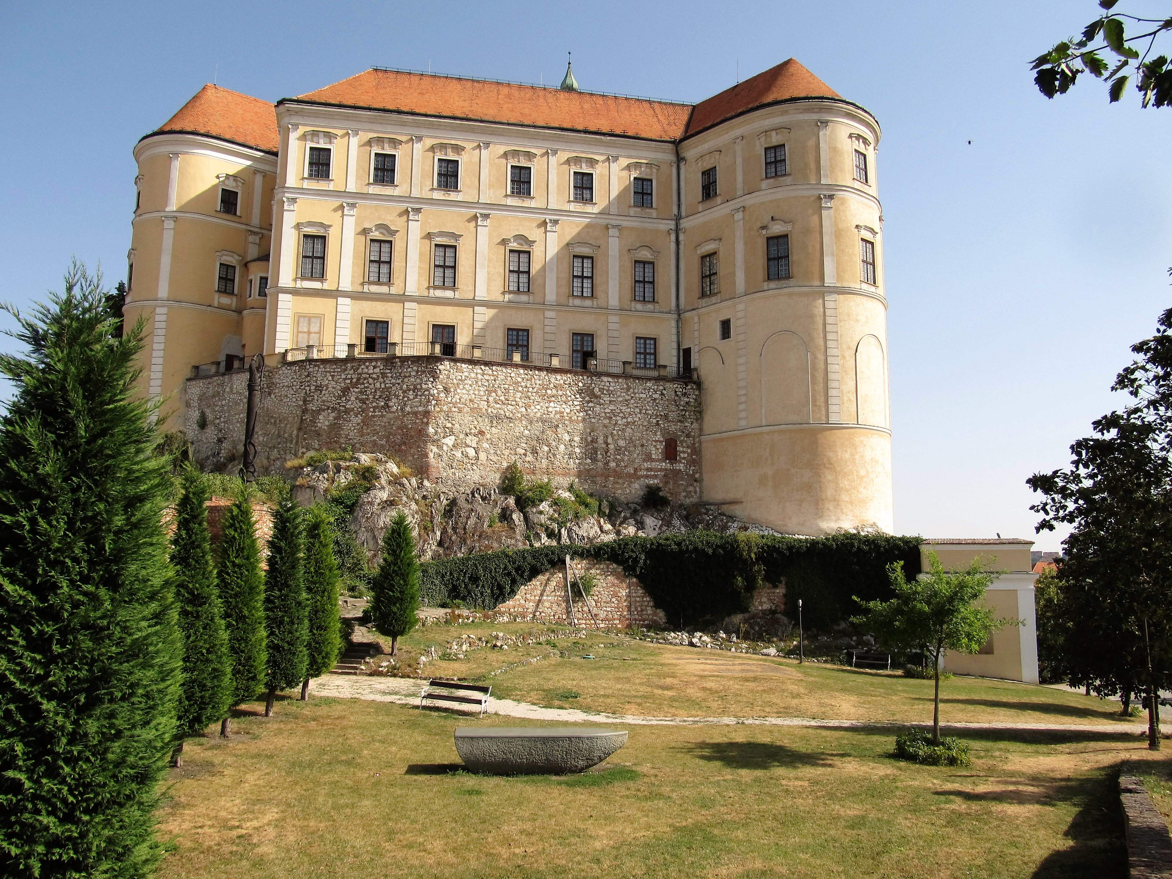 Zámek Mikulov